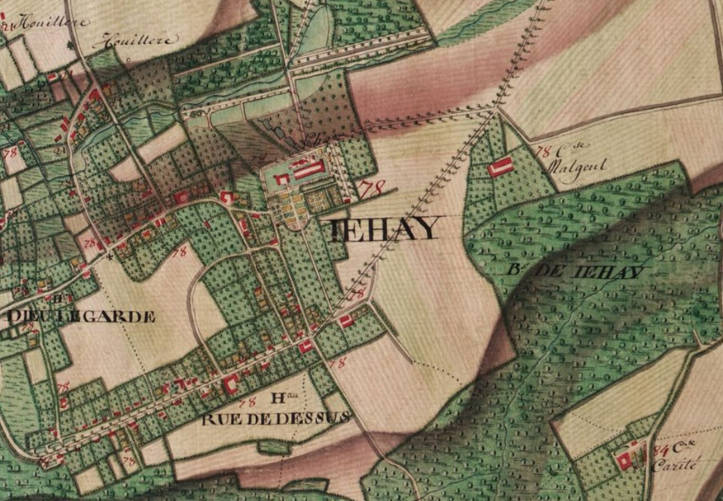 Extrait de la carte de Ferraris n° 153B